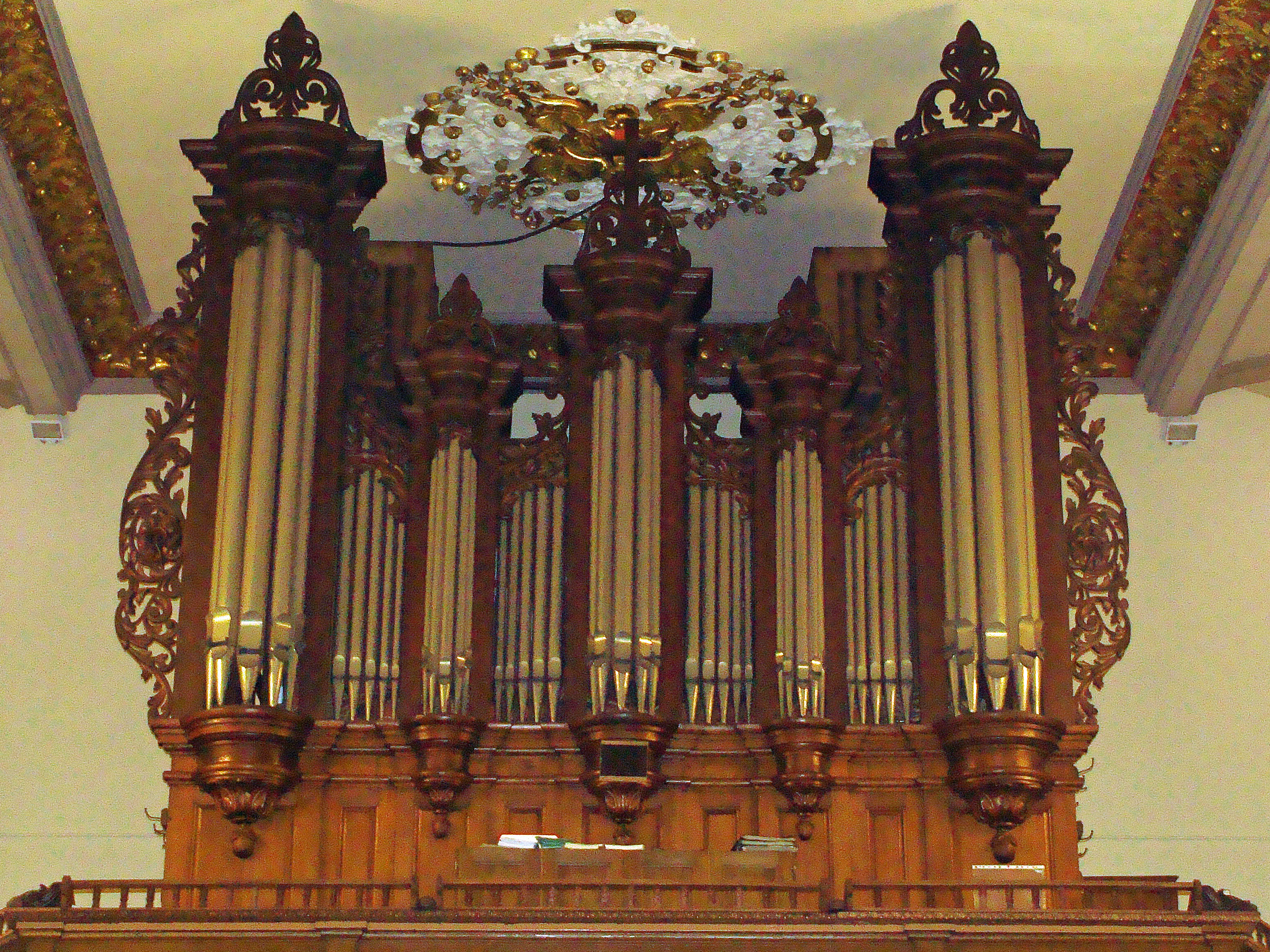 Orgues de 1874, église Saint-Nicolas de L'Hôpital (Moselle)